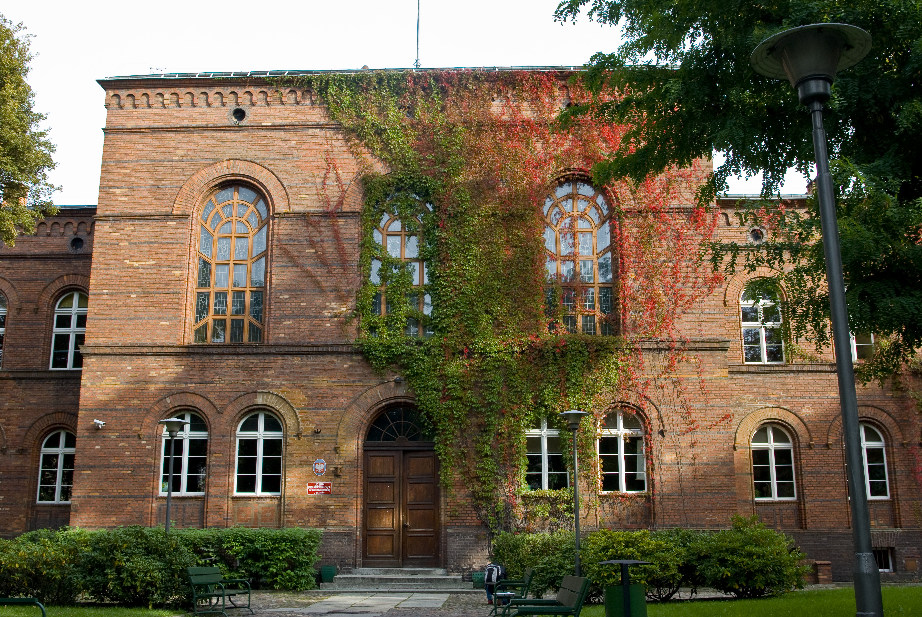 Poznań, ul. Garbary 24 - Gimnazjum św. Marii Magdaleny (zabytek nr A 221)